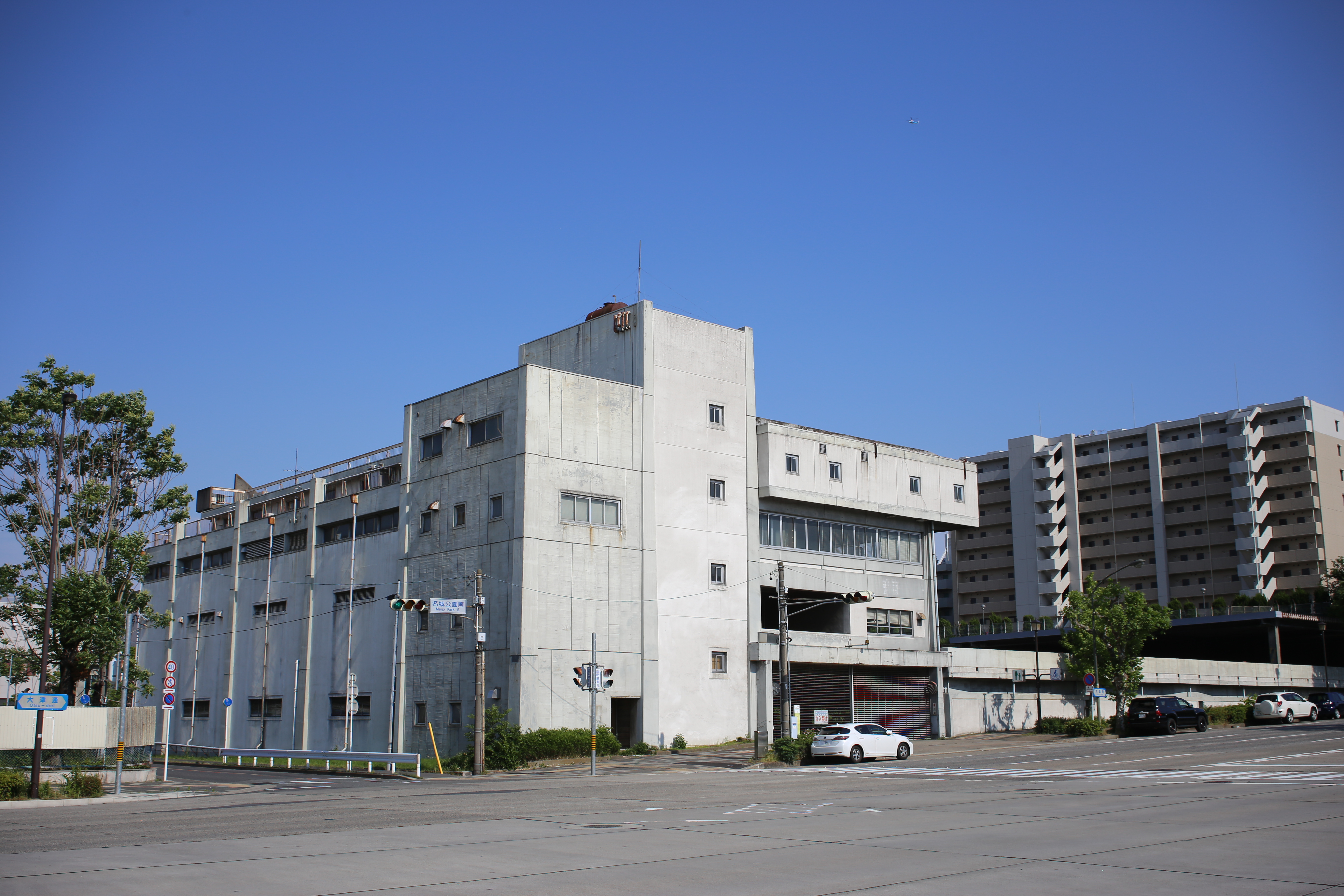 名古屋市中区三の丸に所在した名古屋市交通局名城工場の建物を北西側から写す